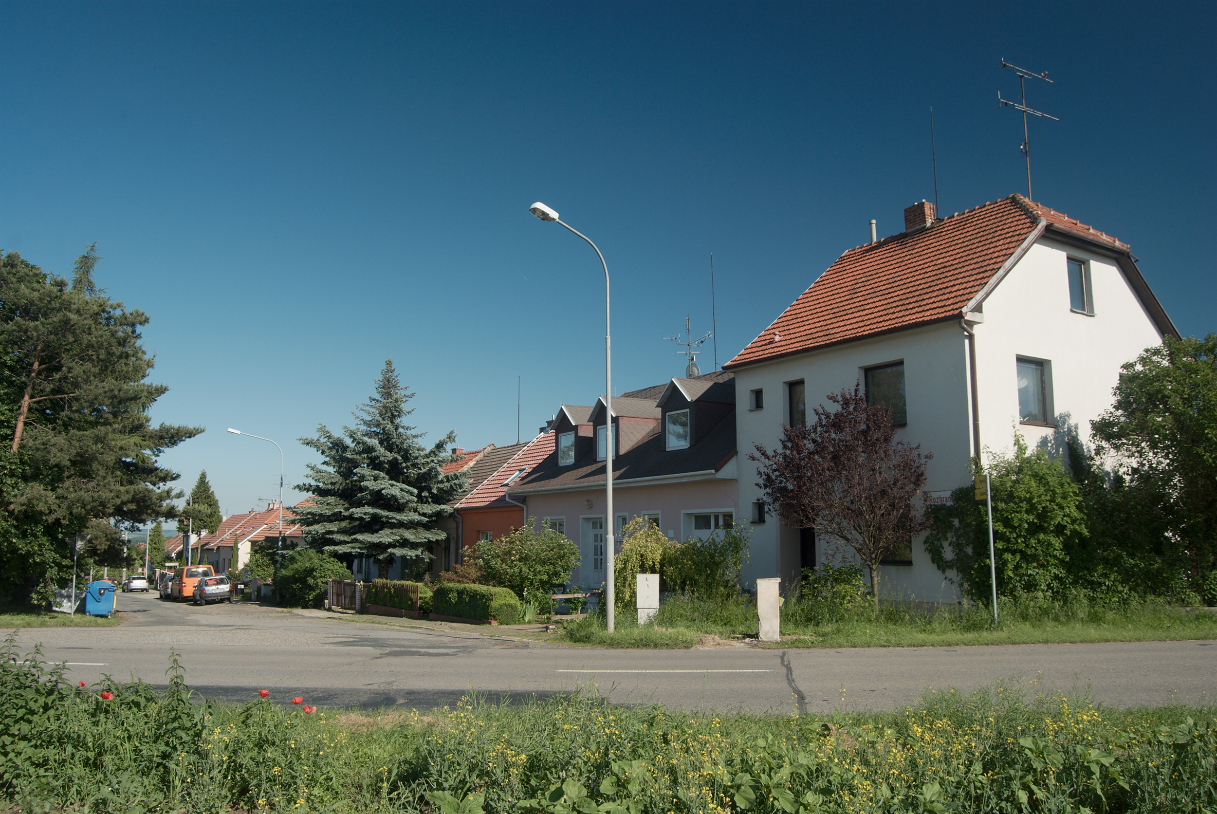 Brno-Nové Moravany - ulice Rozhraní vyfotografovaná od západu z hranice statutárního města Brna a obce Moravany